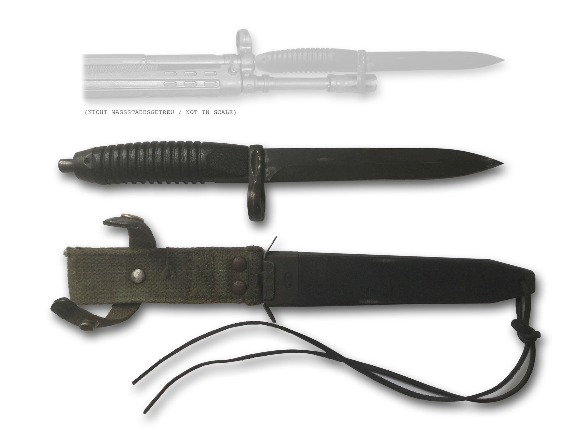 Bajonett und Scheide für das deutsche Sturmgewehr "HK G3". Das Bajonett wurde nie an die Truppe ausgegeben, war aber in den frühen 1980ern durchaus "im sog. Kasernen-Bestand". Die Klinge ist an den Seiten stumpf, weißt also keinerlei Schneide auf, und war als reine Stichwaffe ausgelegt. Schleifen bzw. Entfernung der mattschwarzen Lackierung hatte zu unterbleiben (Lichtreflexion/Blendwirkung). Vereinzelt wurde das Bajonett bei manchen Einheiten (z.B. Schwimmbrücken-Pioniere / M-Bootfahrer) in Eigeninitiative ausgegeben/beschafft, um (dann mit geschliffener Klinge) Seile und Taue zu zertrennen.